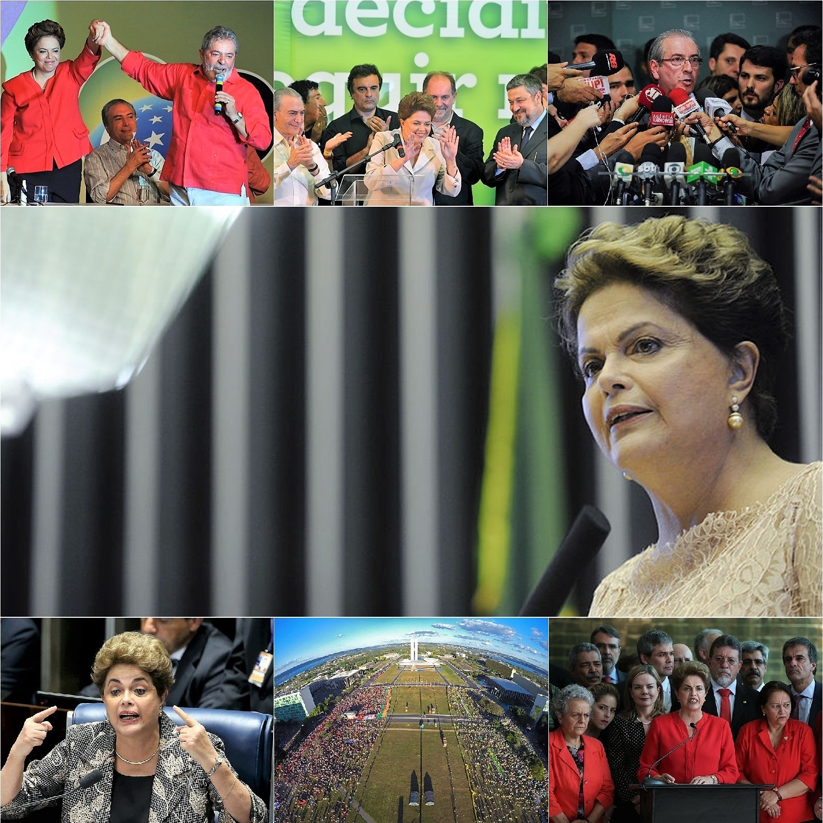 Imagens relacionadas ao processo de impeachment de Dilma Rousseff.